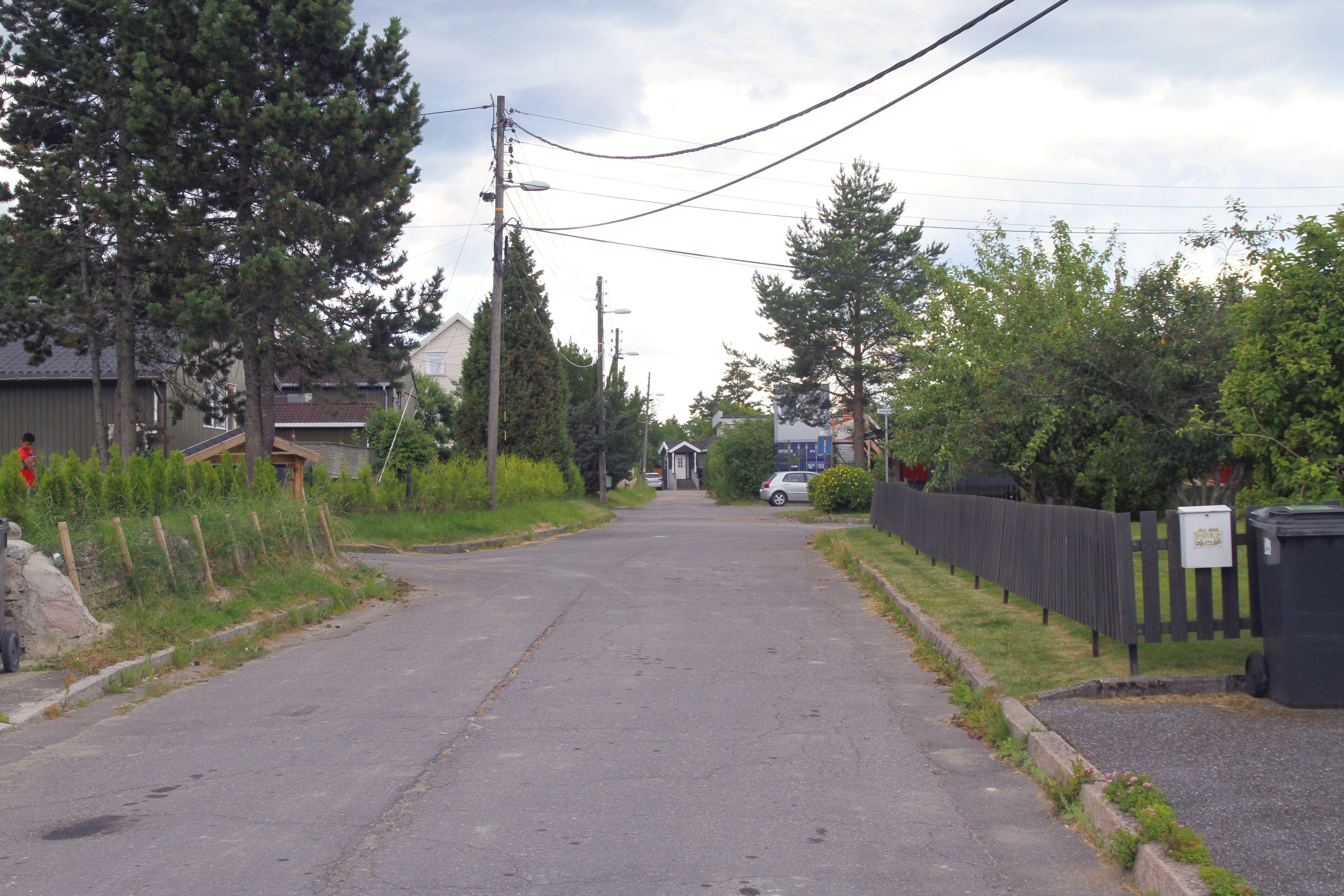 Soleglad i Oslo.